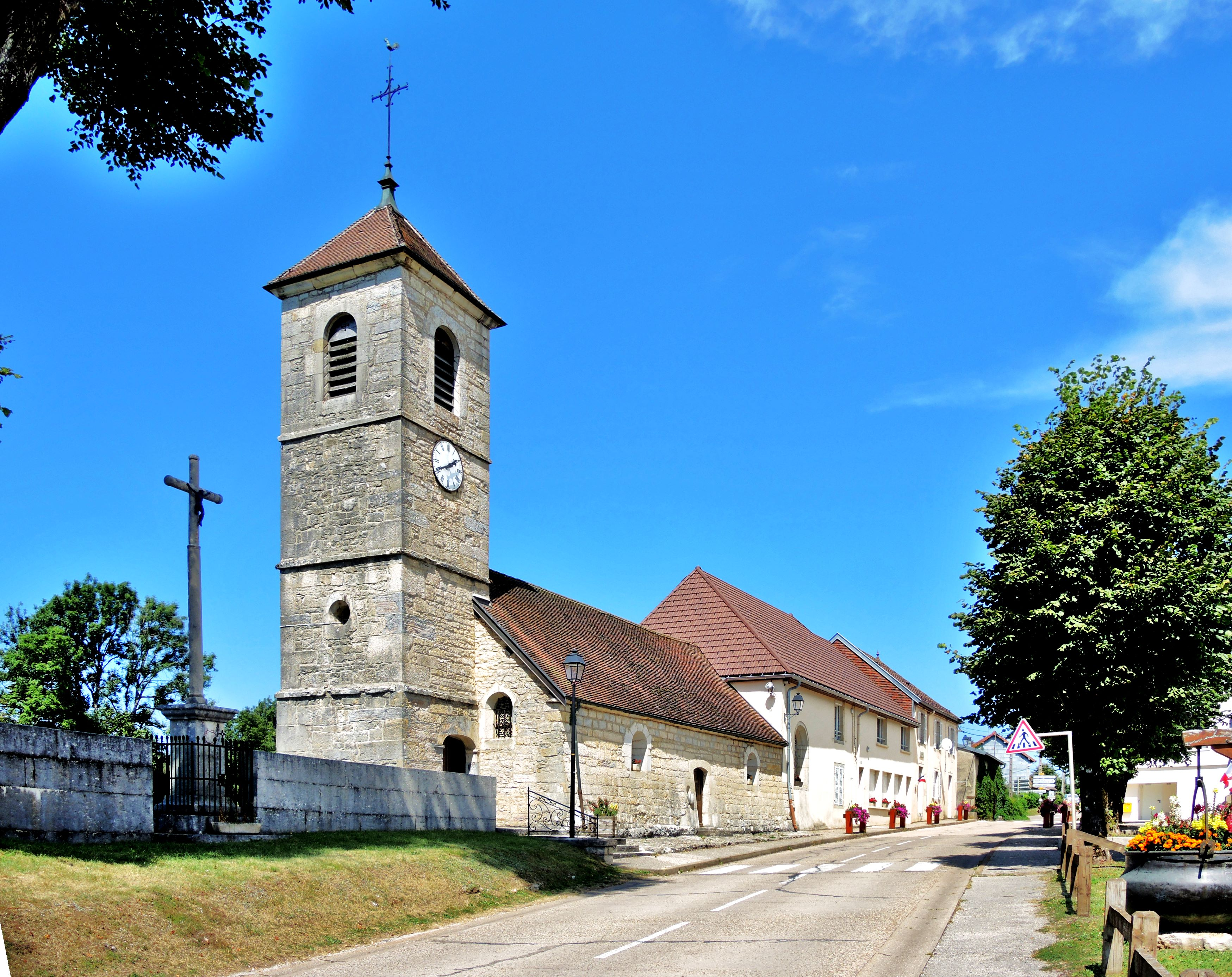 Eglise du village de Le Frasnois